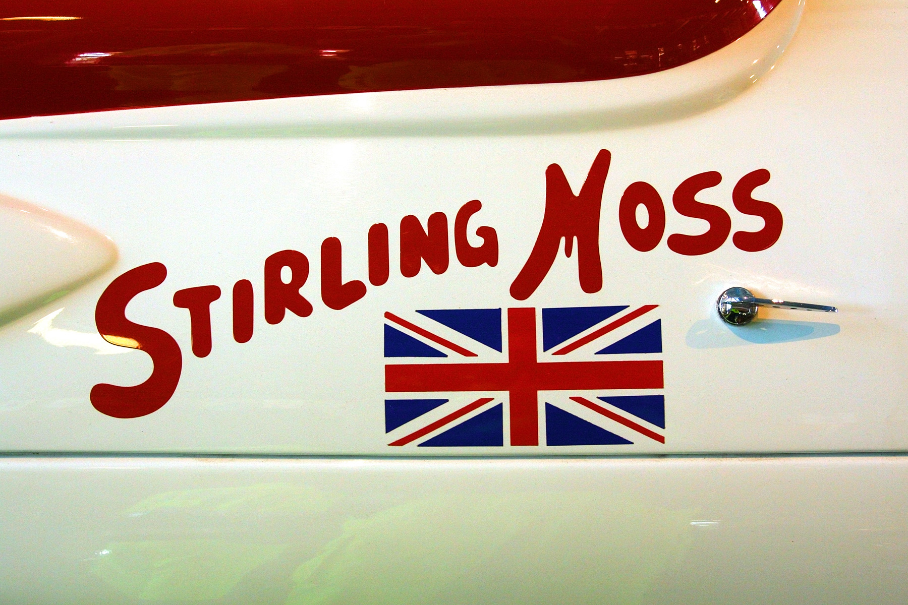 Museo Umberto Panini (Modena)